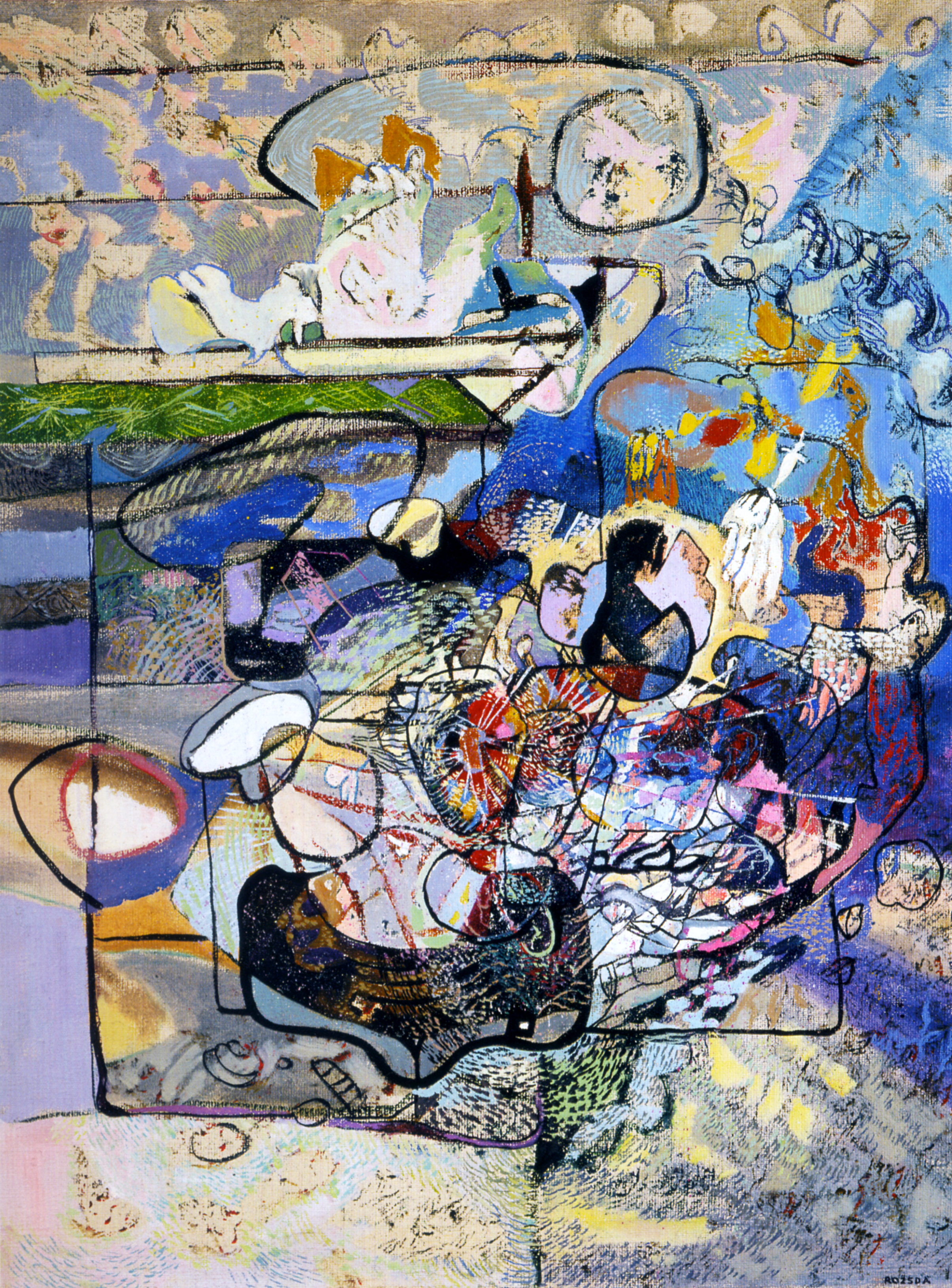 Szürrealista festmény